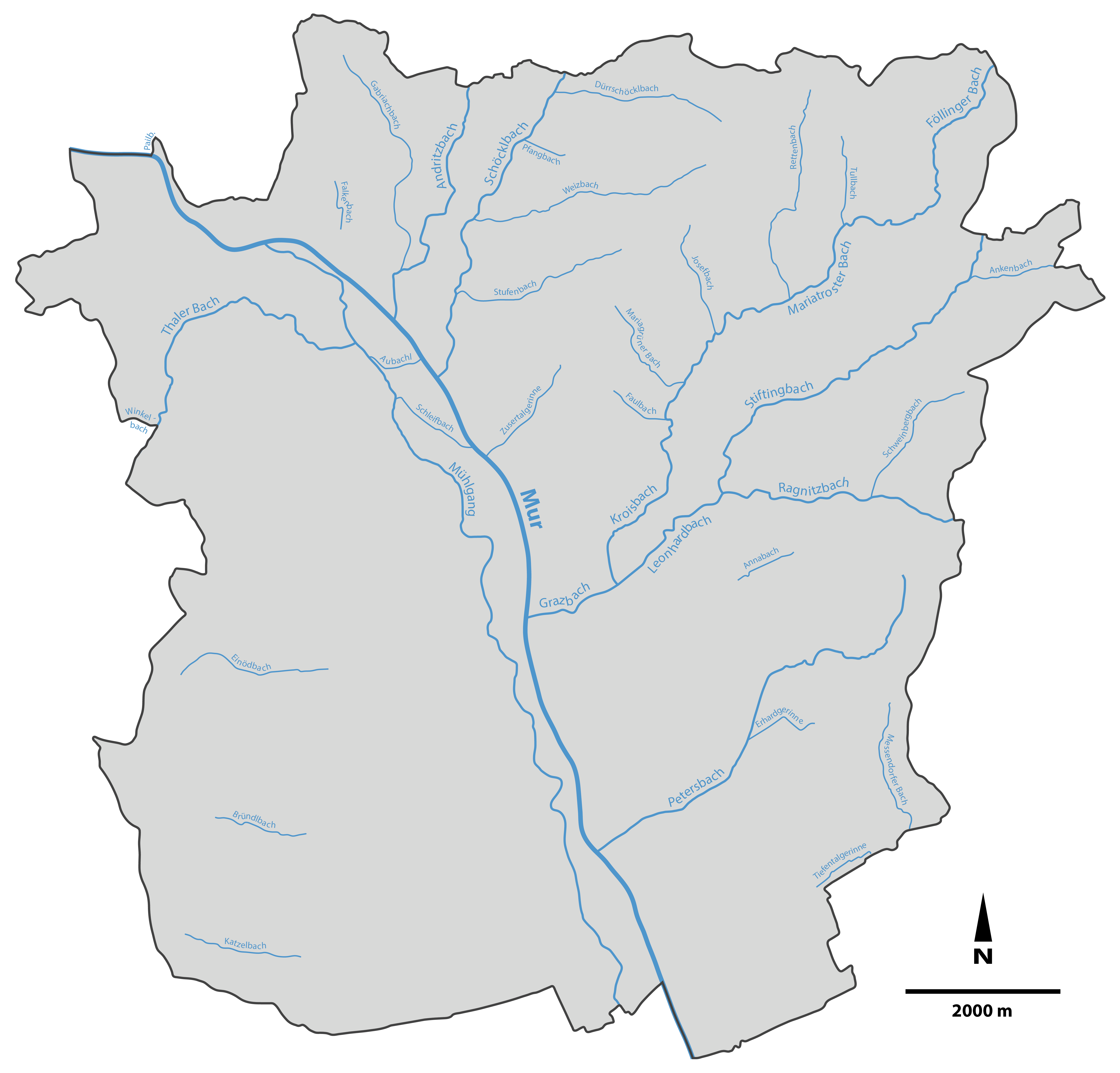 Karte mit allen Grazer Fließgewässern, die im WebGIS der Stadt Graz oder im GIS Steiermark namentlich verzeichnet sind